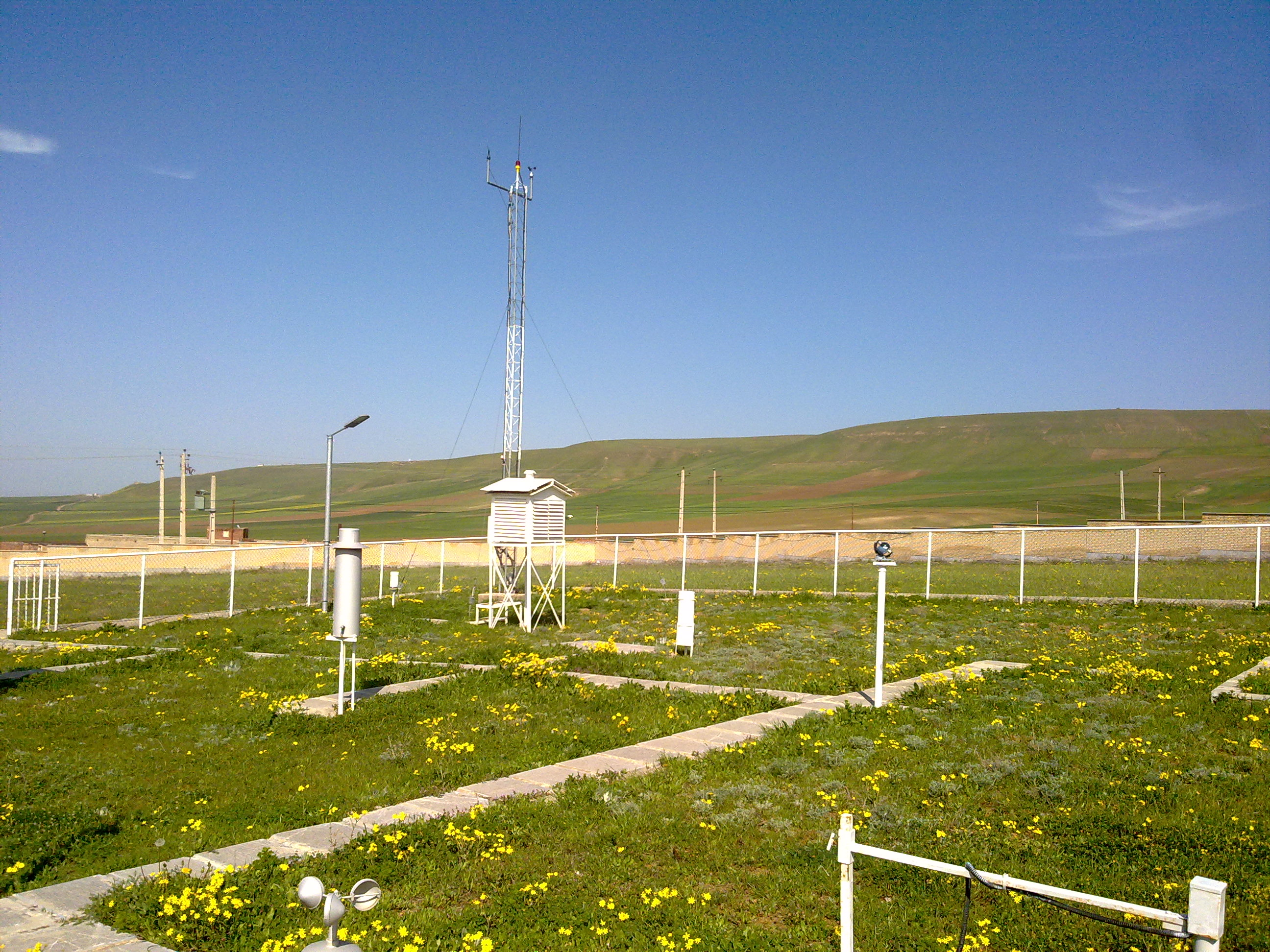 ايستگاه هواشناسي گرمي